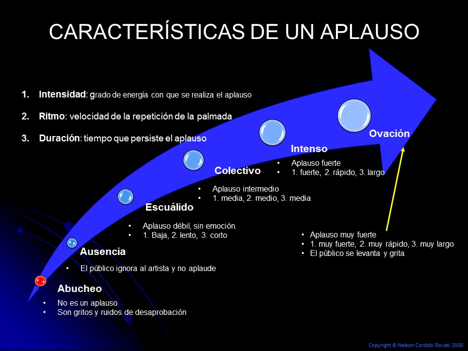 Describe las seis posibles categorías de un aplauso. Modelo de Nelson